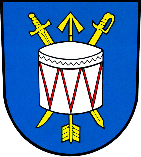 Znak obce Valšov